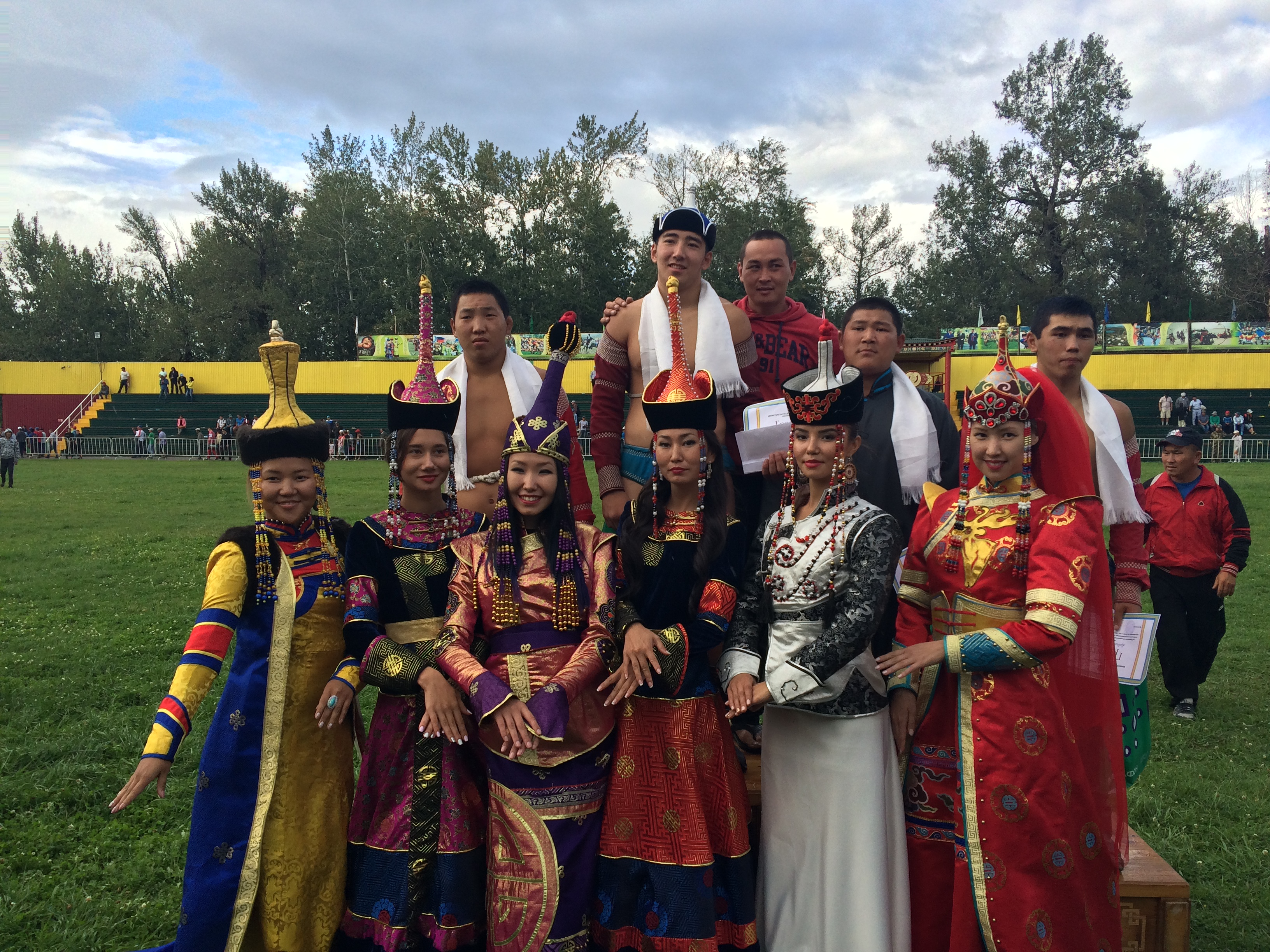 Борцы и девушки-даңгына. 13 августа 2016 Тыва дыл: Мөгелер биле Даңгыналар. Аныяктар аразынга Наадым Хүрежи. 2016ч 8а 13х.